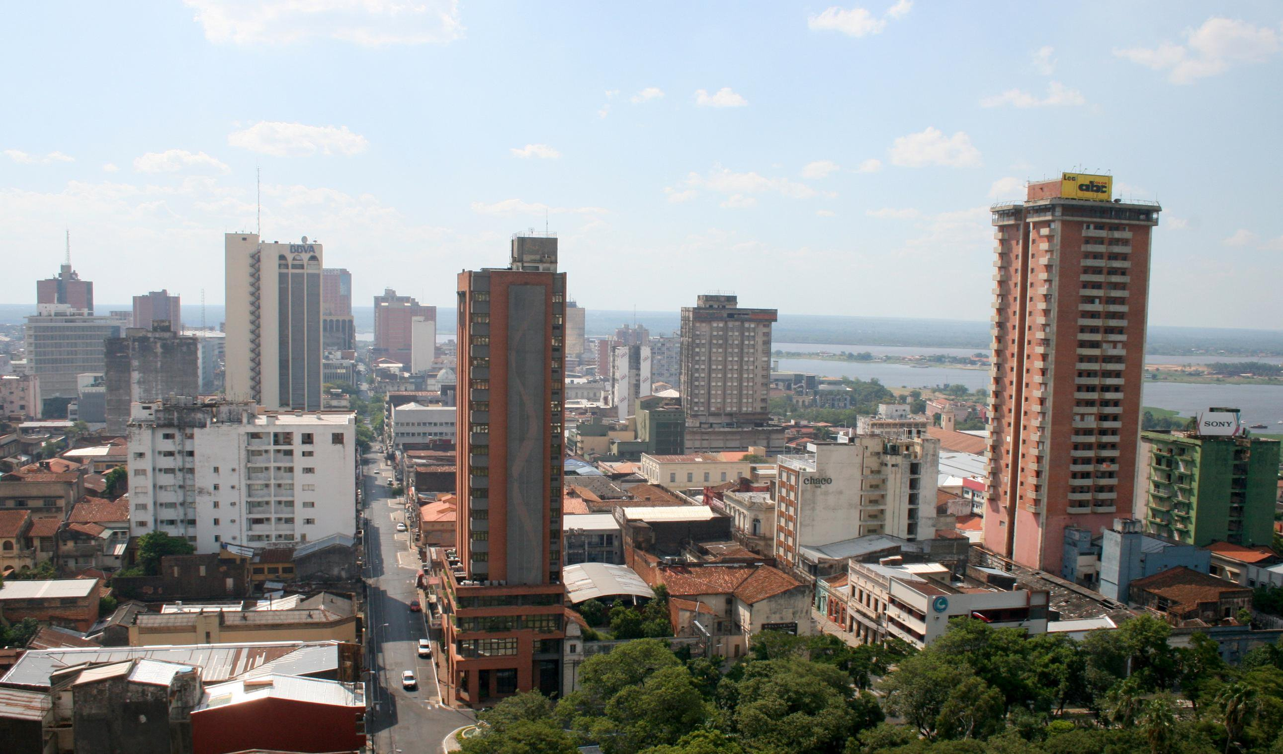 Panorámica del Centro Histórico de la ciudad capital de Paraguay, Nuestra Señora de la Asunción.